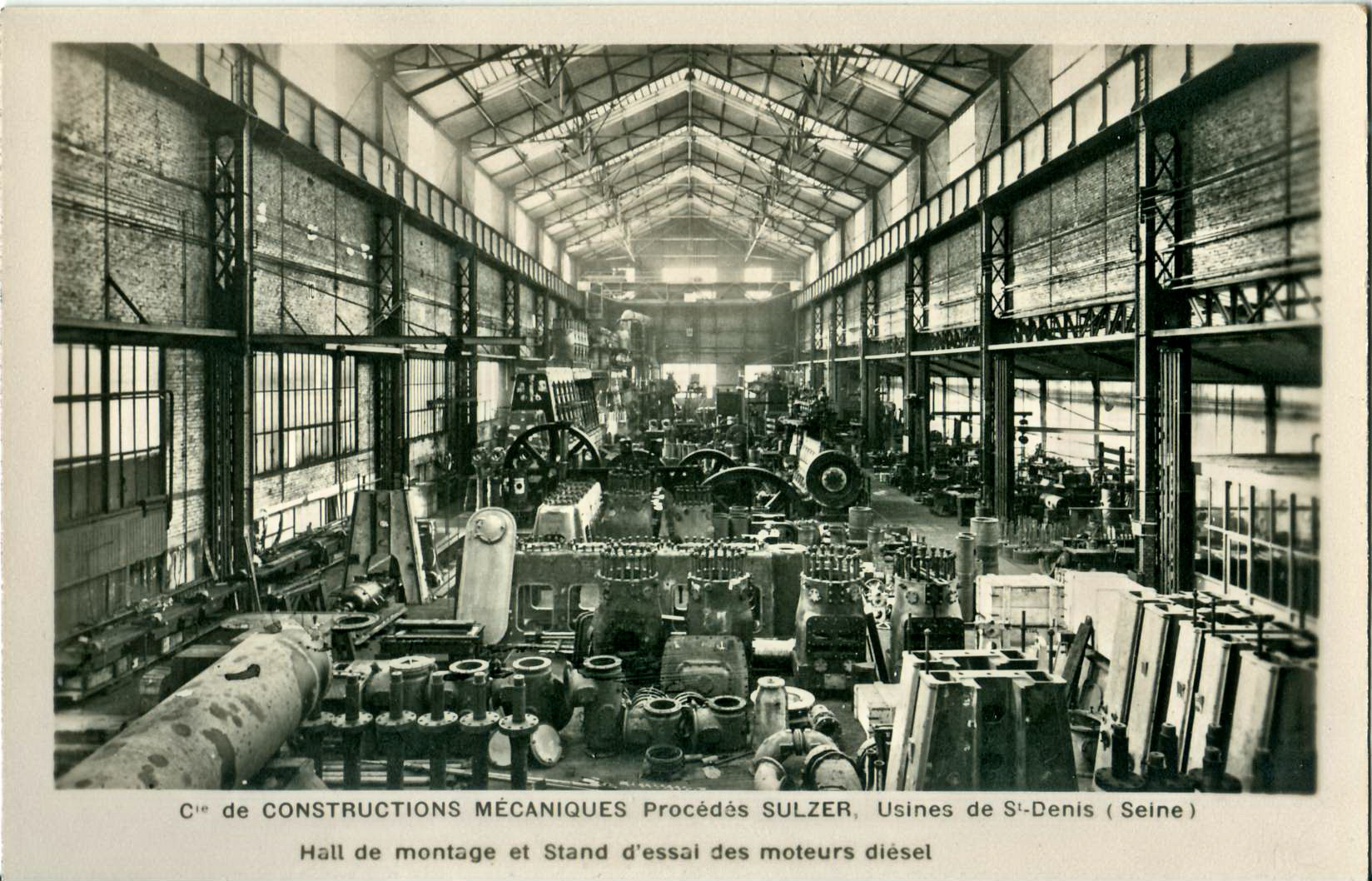 Carte publicitaire de l'entreprise SulzerUsine de Saint-Denis (Seine-Saint-Denis) : Hall de montage et stand d'essai des moteurs diésel